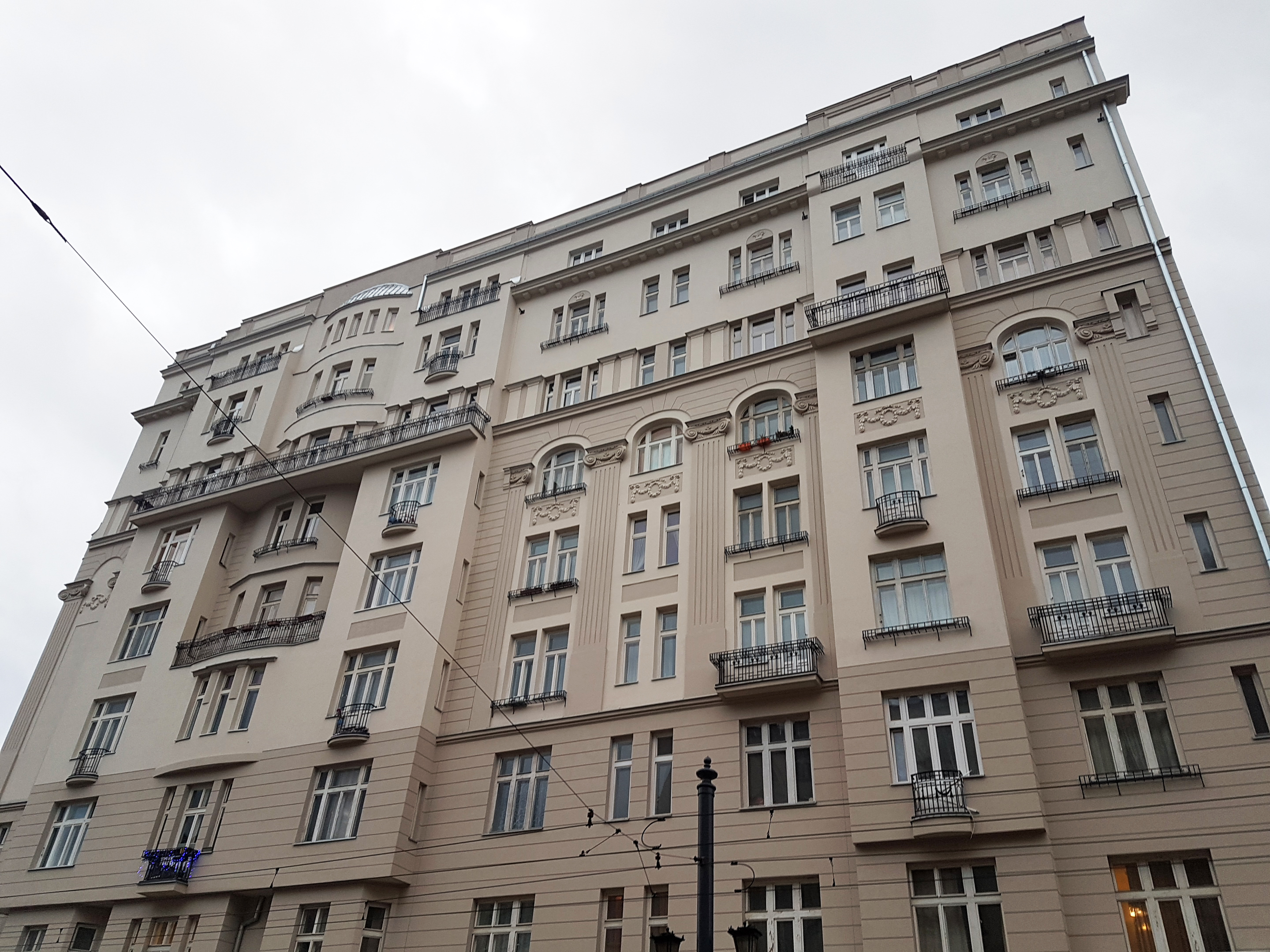 Elewacja wschodnia kamienicy przy ul. Marszałkowskiej 1 (2018)